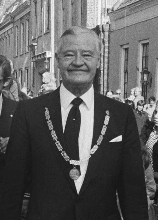 Prinses Margriet in Elburg